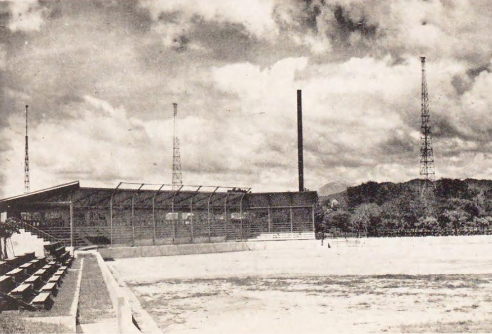 臺中市野球場，為現在的台中棒球場